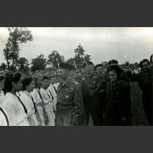 Bór-Komorowski wizytuje Maczków